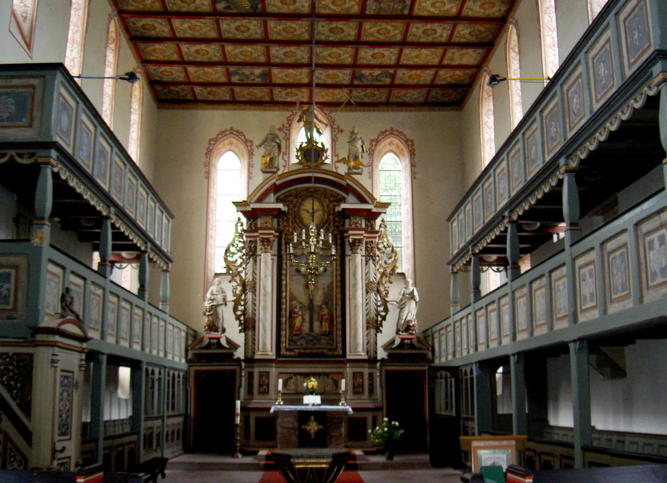 St.-Marien-Kirche in Barby (Elbe)